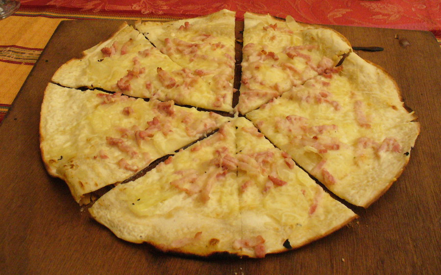 Flammkuchen Elsass mit Käse/fromage